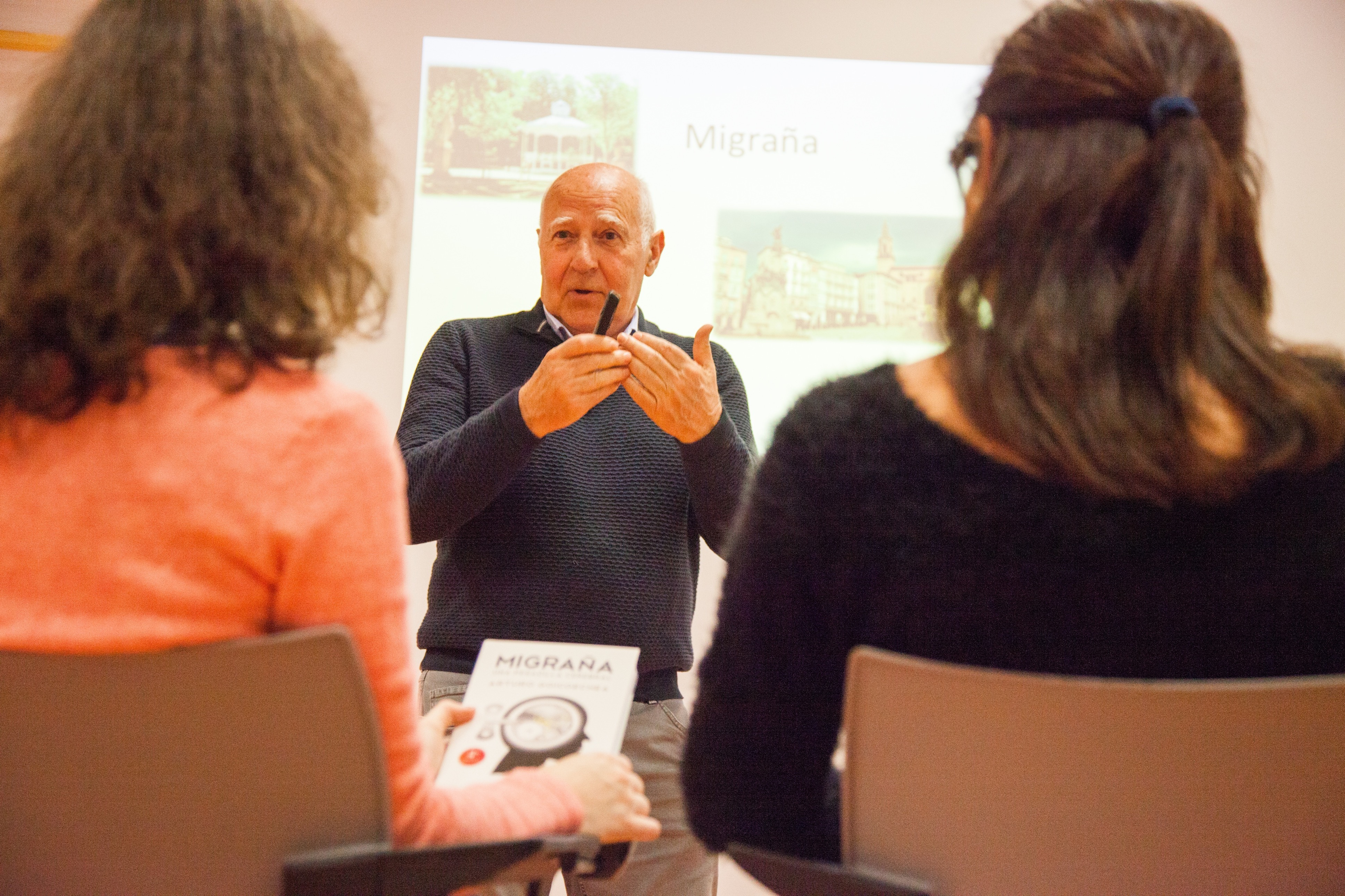 arturo goicoechea courses